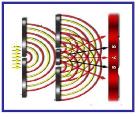 Zirrikitu bikoitzeko esperimentua